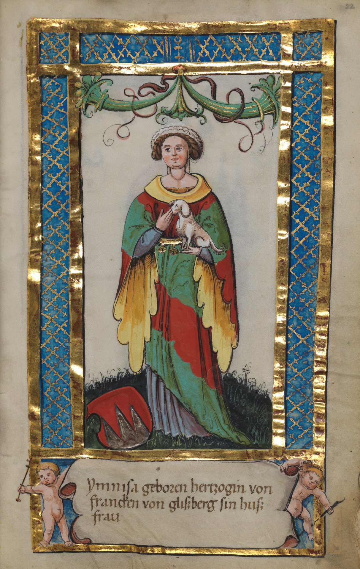 Weingartener Stifterbüchlein, Württembergische Landesbibliothek Stuttgart, Cod.hist.qt.584, fol. 22r, Stifterbild Imizza (Irmgard), Ehefrau von Welf II. Ymnisa geboren hertzogin von francken von glißberg sin husfrau